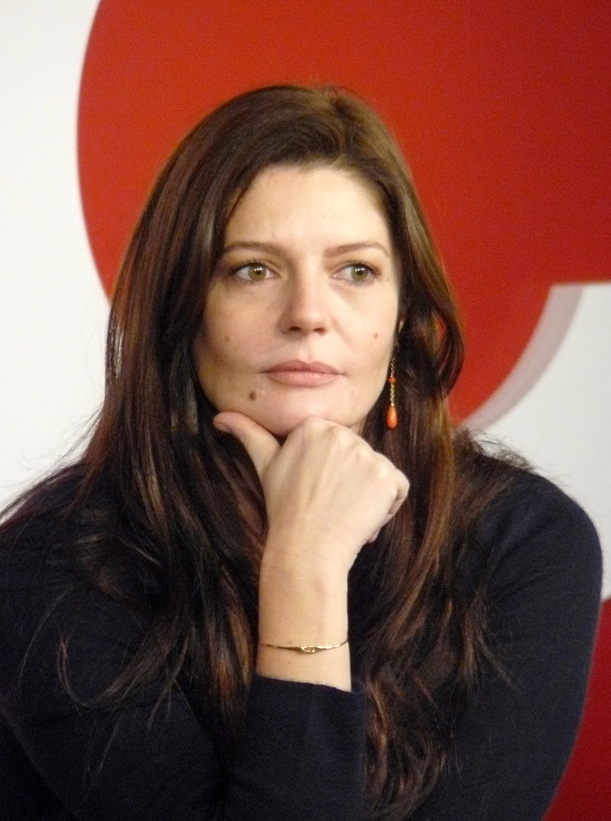 Chiara Mastroianni (née en 1972), actrice franco-italienne. Lors de la présentation de la sortie DVD de son film Non, ma fille tu n'iras pas danser ! à la FNAC Montparnasse, le 23 janvier 2010.